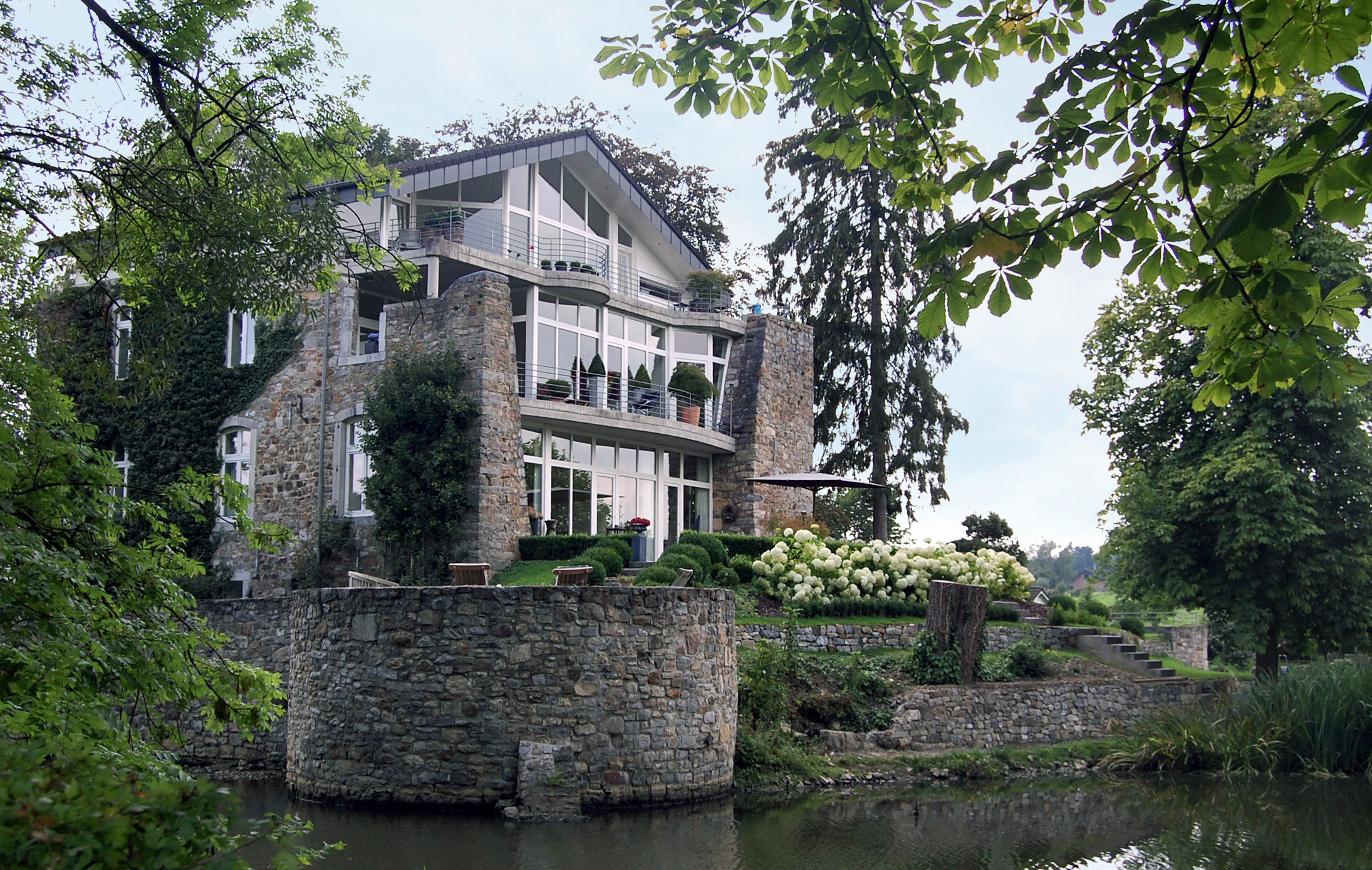 Das Vlattenhaus in Eynatten, Belgien